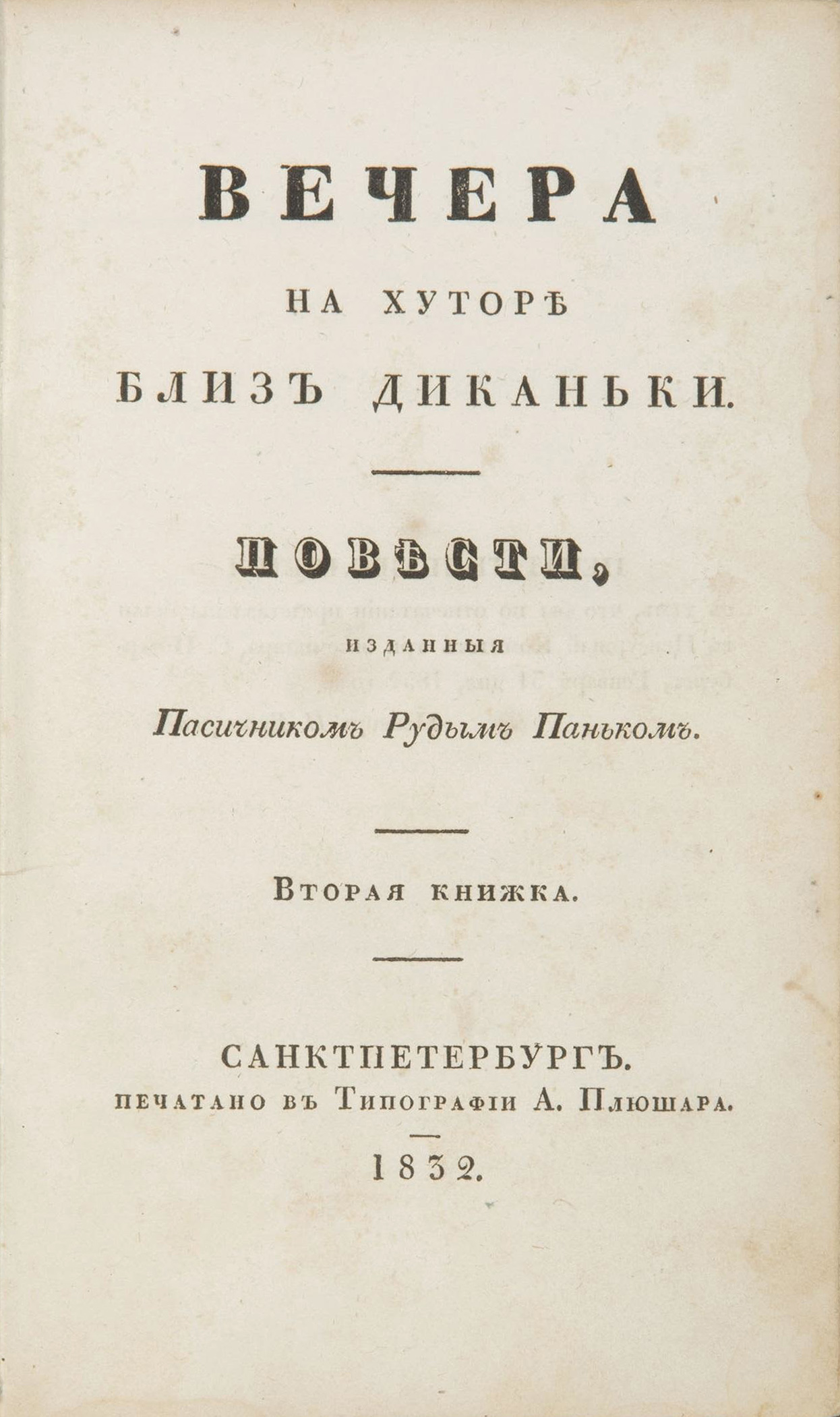 Вечера на хуторе близ диканьки. Вторая книжка. 1832